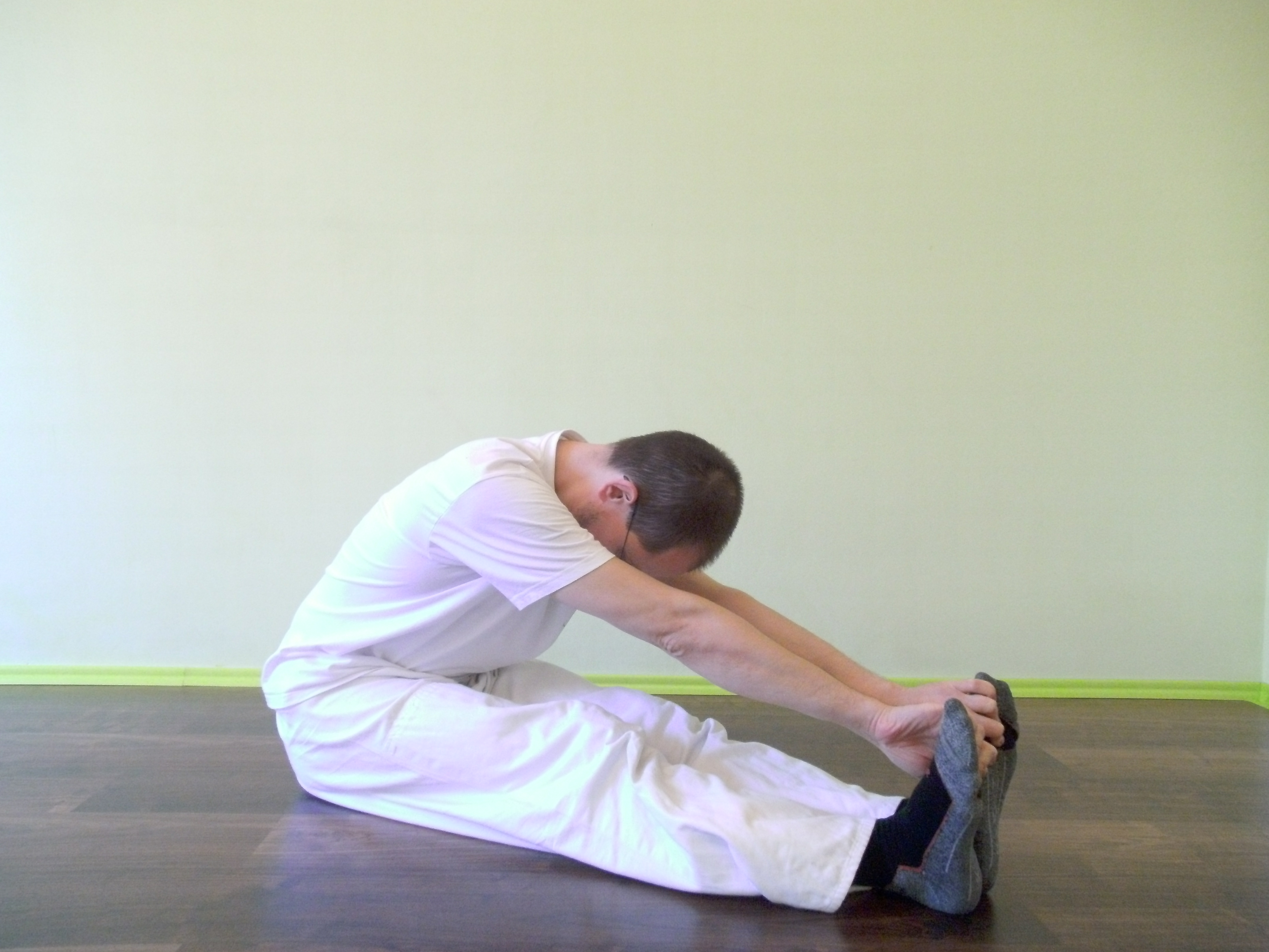 Makko Ho Übung für Blasen- und Nierenmeridian